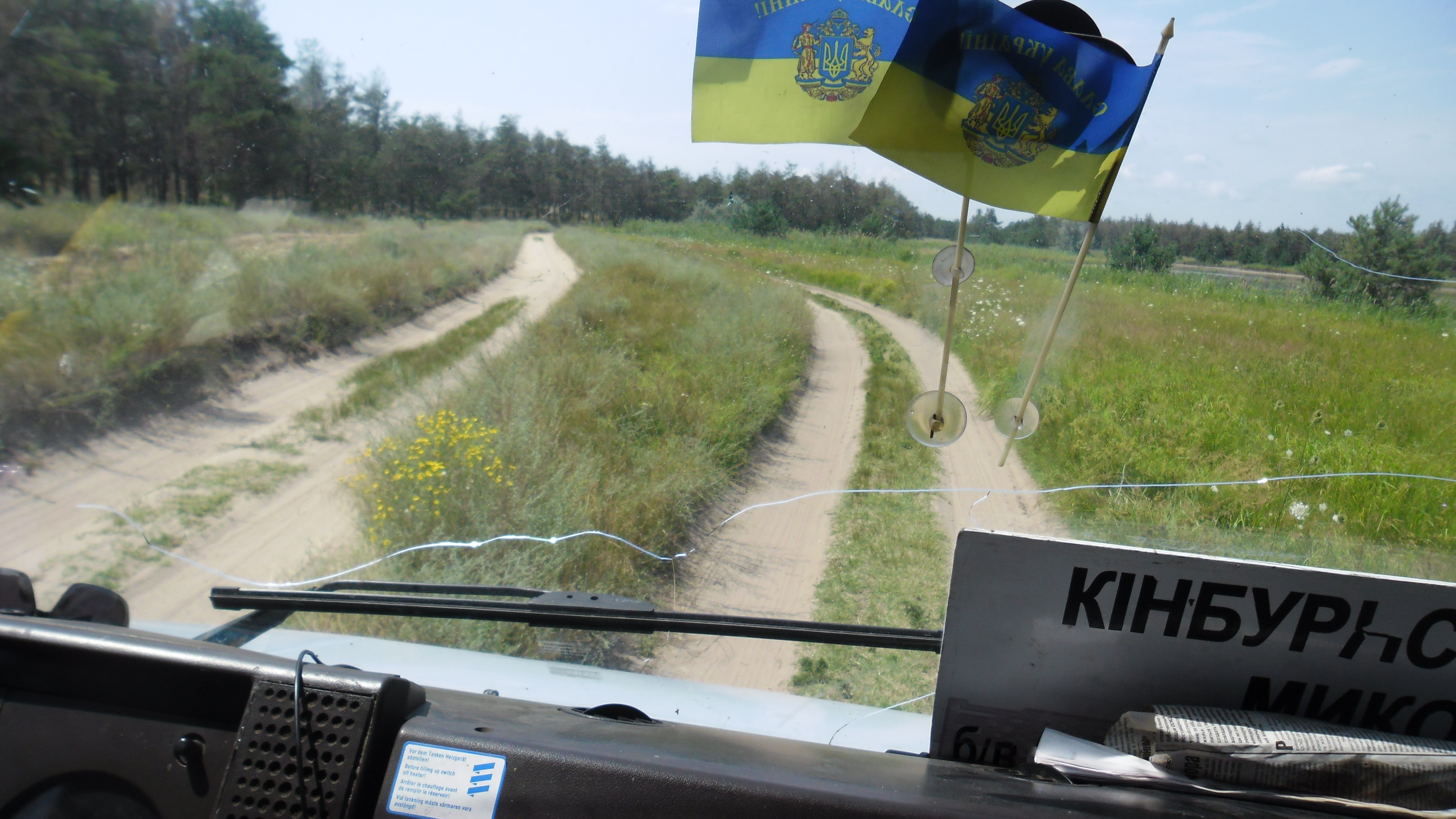 Фото дороги на Кінбурн